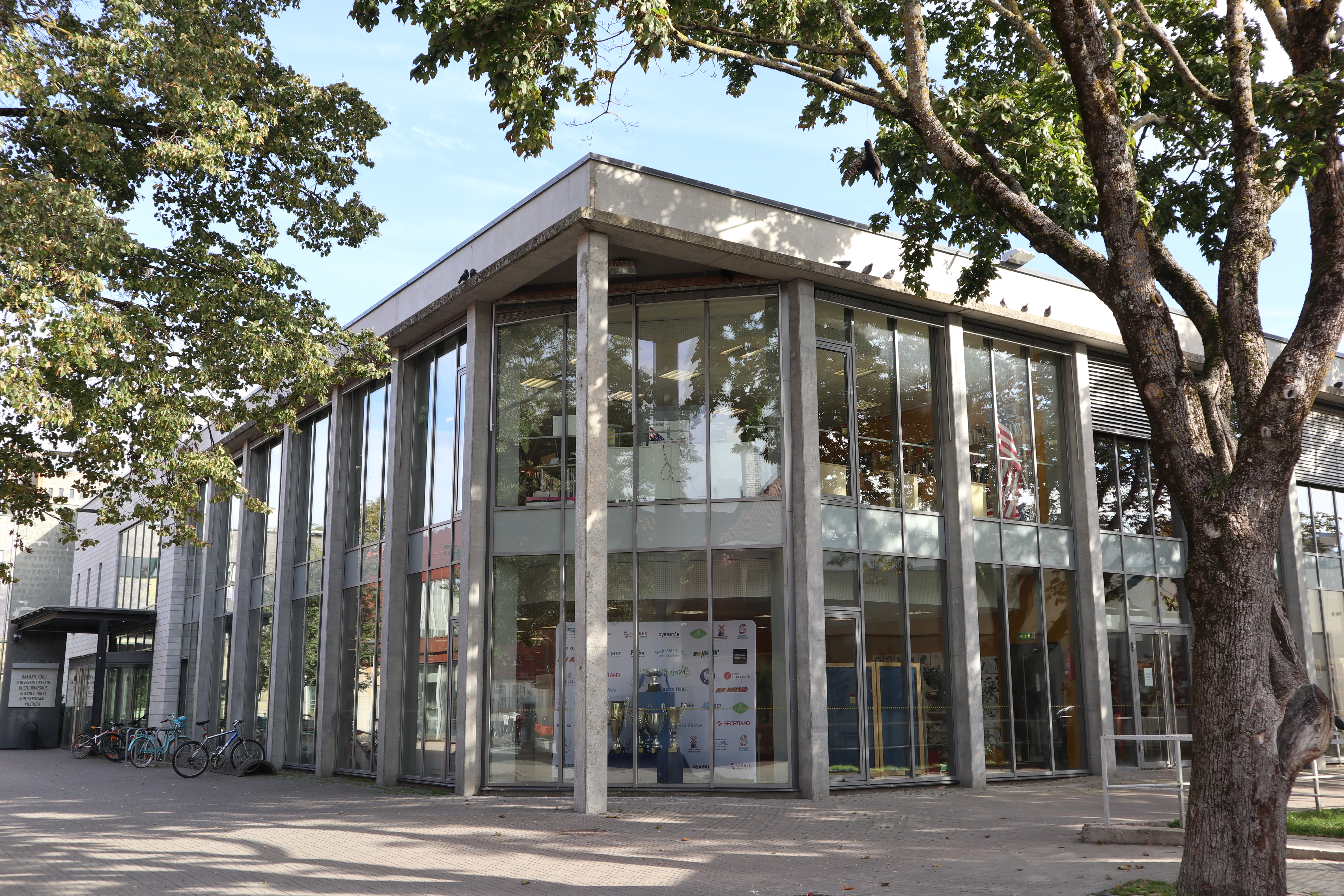 Saare Maakonna Keskraamatukogu 2019